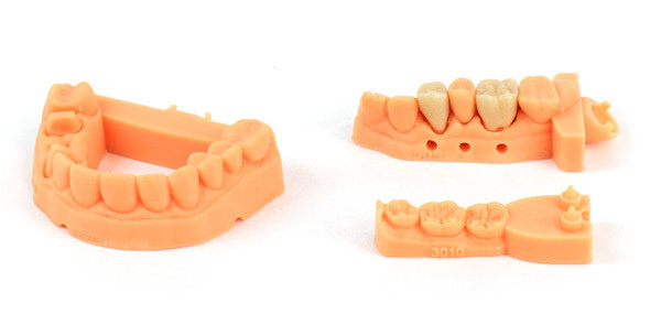 perstona baten inprimatutako protesia